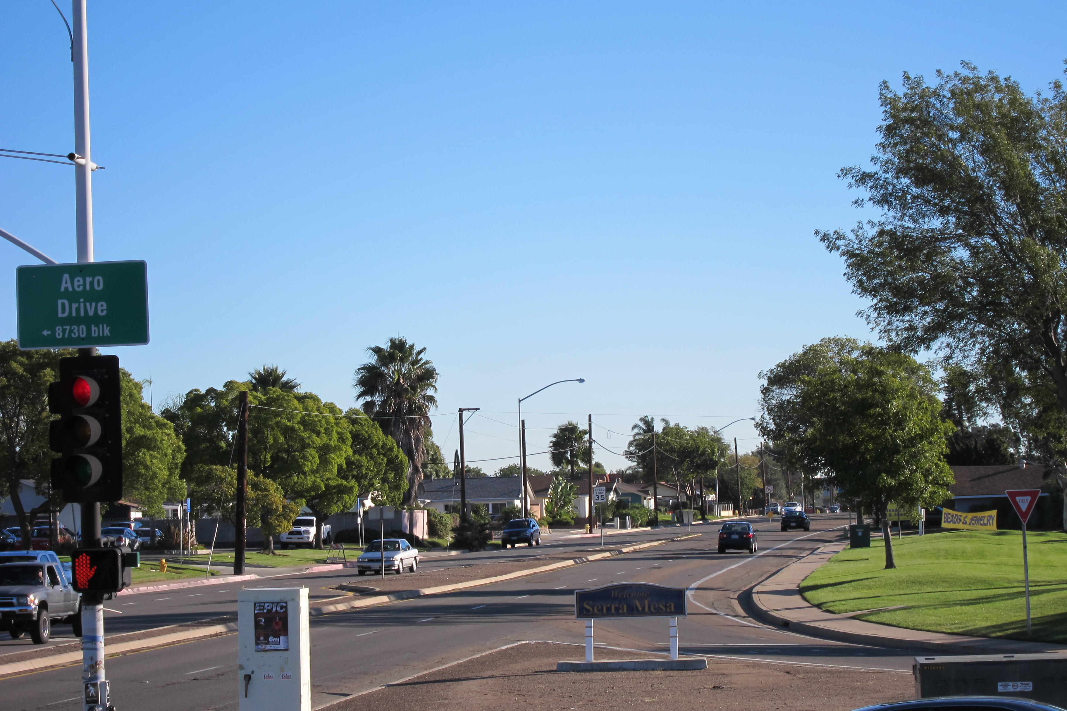 Entrance to Serra Mesa from Aero Drive.